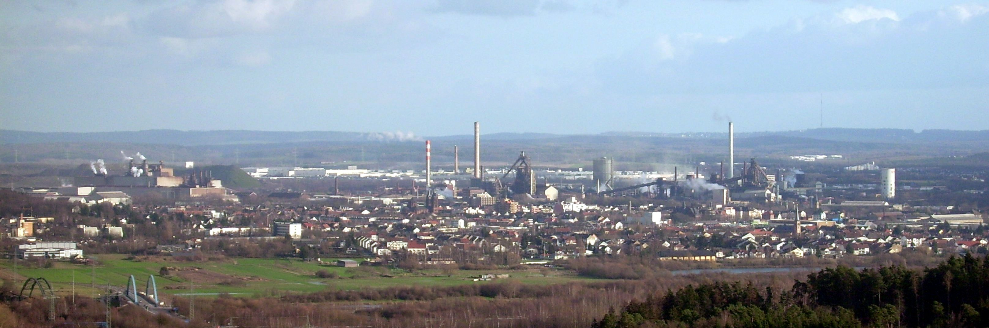 Blick auf Dillingen von der Siersburg